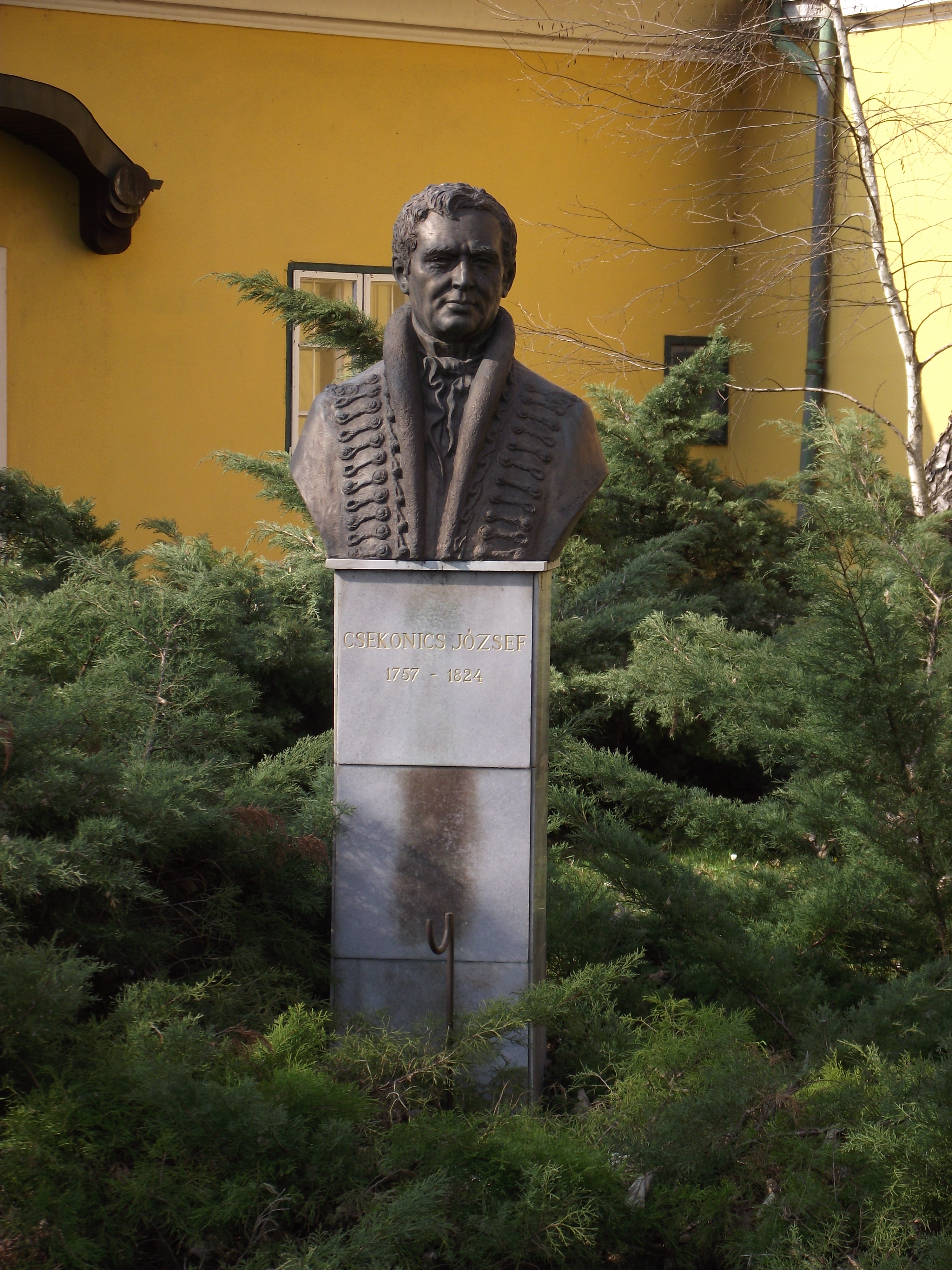 Bábolna - Csekonics József